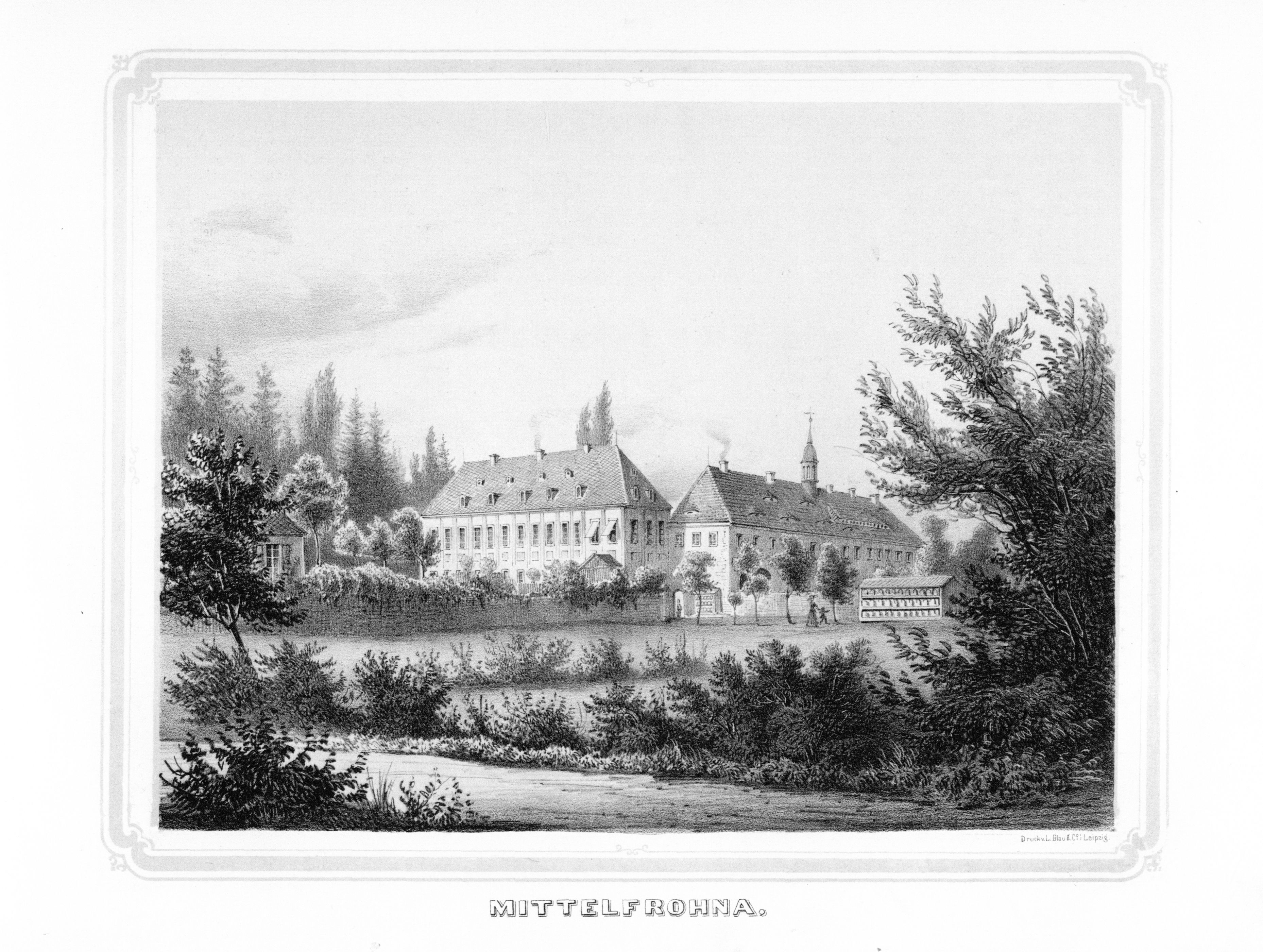 Mittelfrohna aus: Album der Rittergüter und Schlösser im Königreiche Sachsen Erzgebirgischer Kreis Section: IV